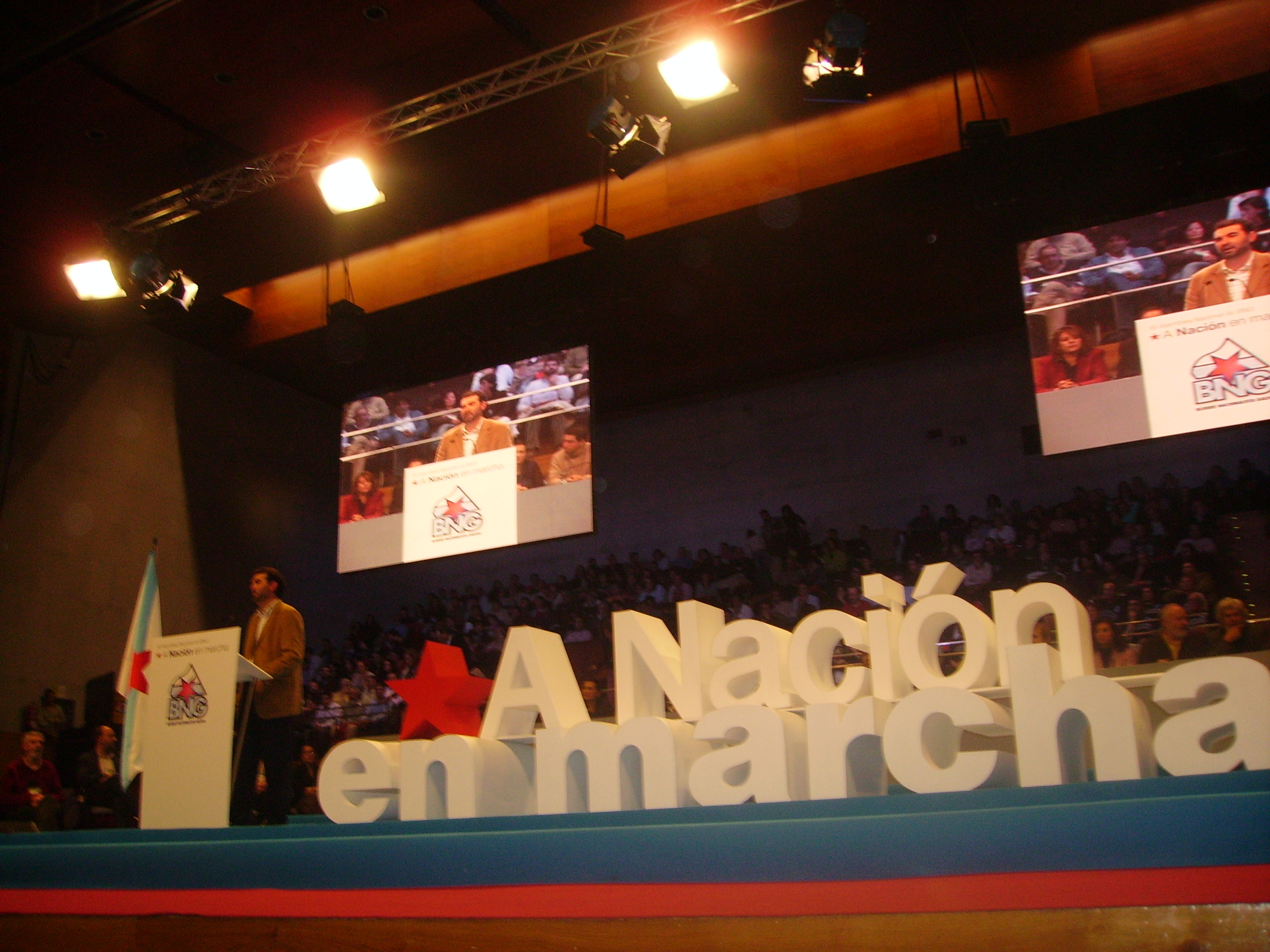 Congreso del Bloque Nacionalista Galego (B.N.G.)en Santiago de Compostela. Discurso de Anxo Quintana